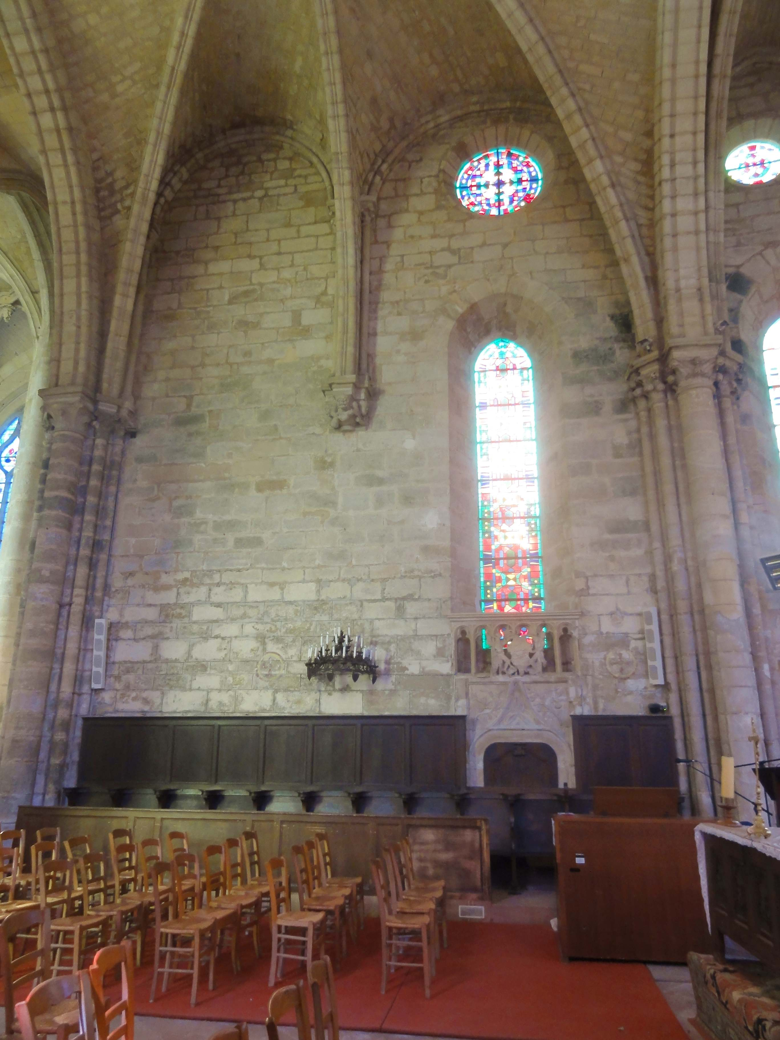 Chœur, 1ère travée, élévation nord.